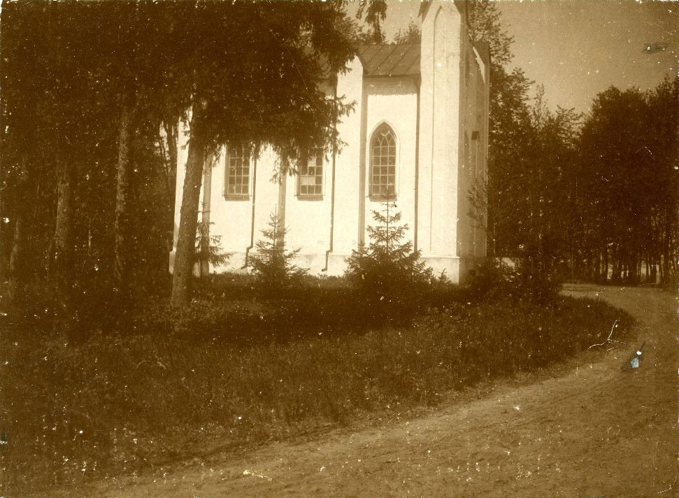 Беларуская (тарашкевіца): Нароўля (Naroŭla), сядзіба Горватаў (Horvat). Капліца